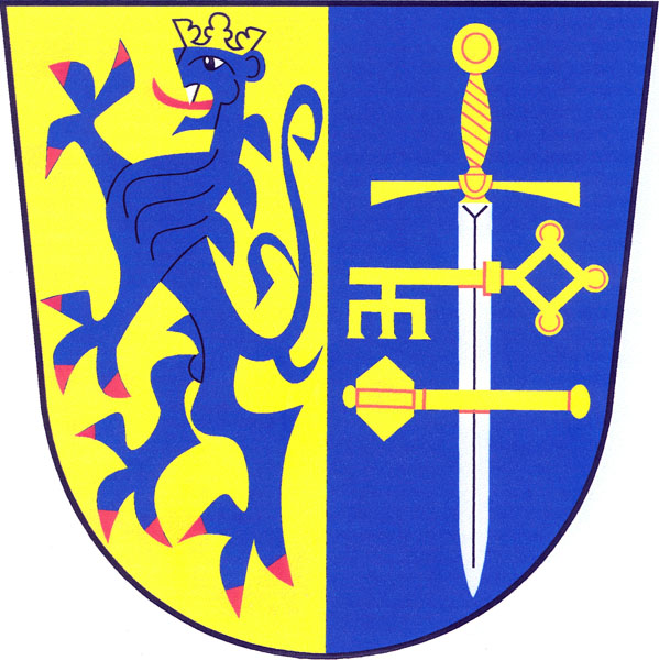 Znak obce Chvatěruby